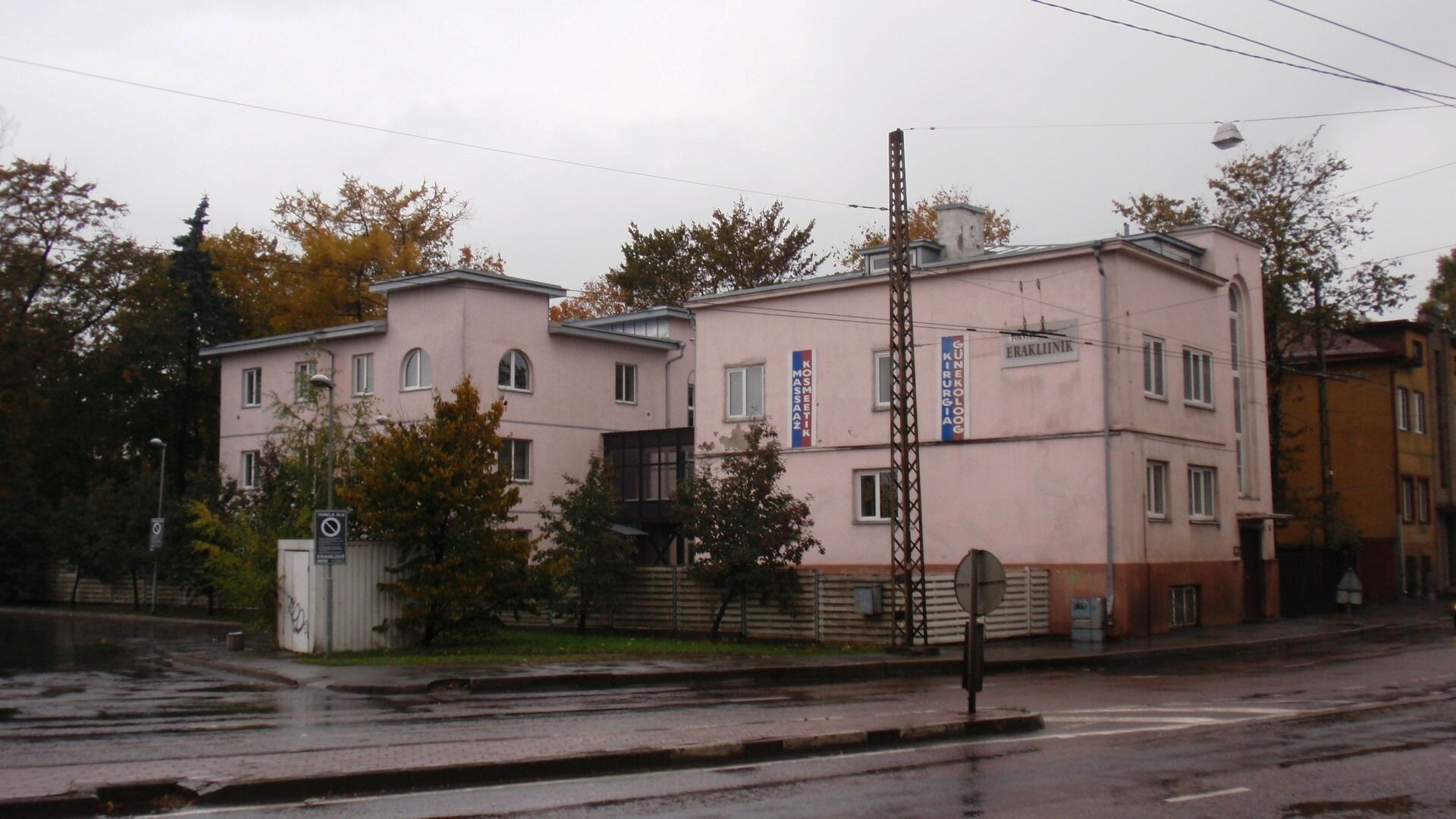 Tulika 42, Tallinn.